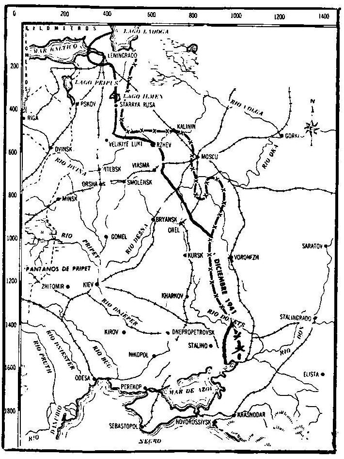 Mapa que muestra las ganancias soviéticas de la contraofensiva invernal lanzada en el invierno de 1941-1942